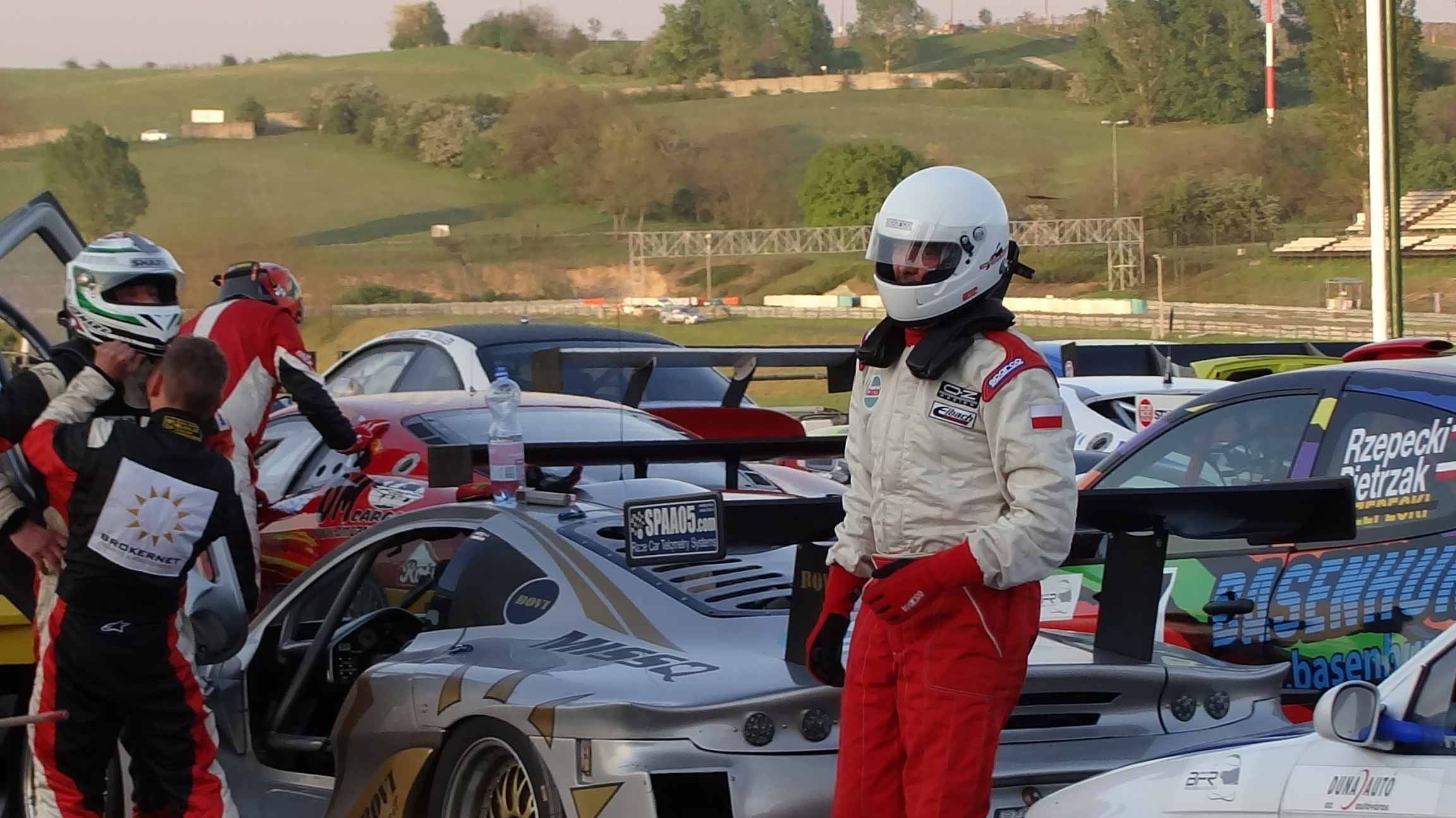 Maciej Roch Pietrzak. Hungaroring 2012.